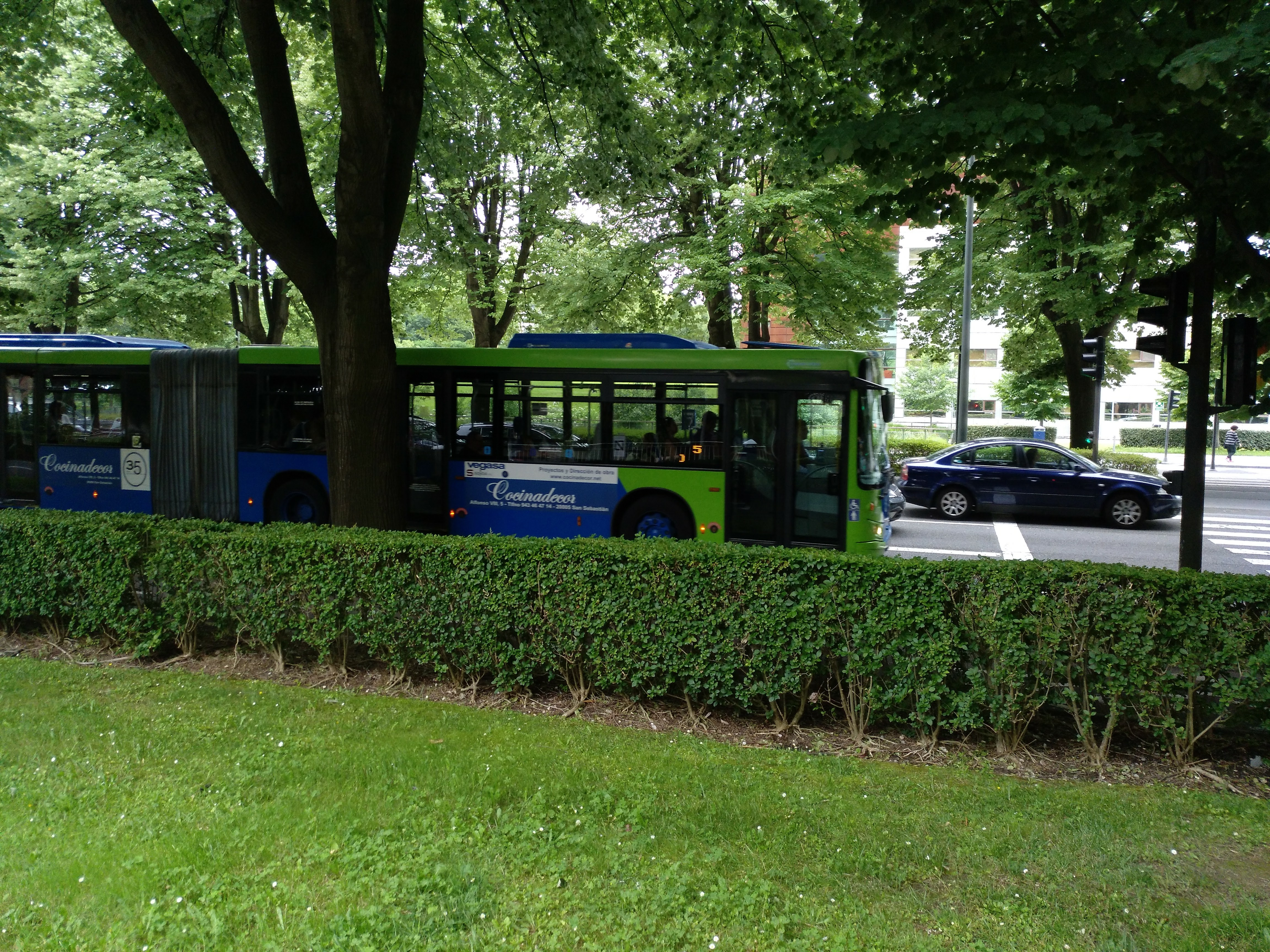 Autobus urbano de d·bus de la línea 5 en la Avenida Tolosa en San Sebastián